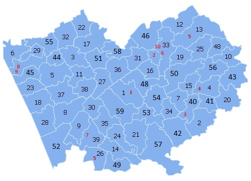 Административная карта Алтайского края